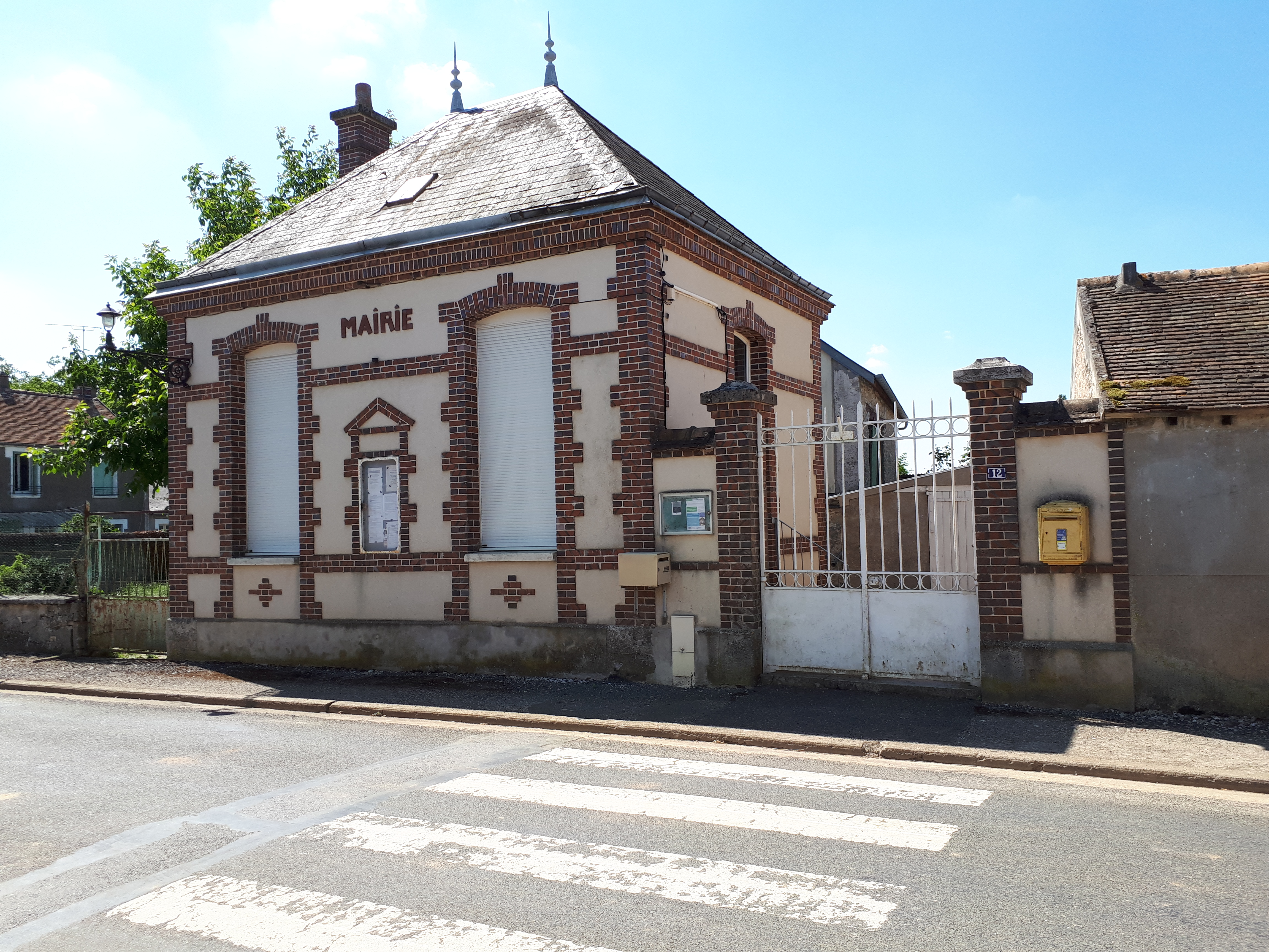 Mairie d'Ardelu.